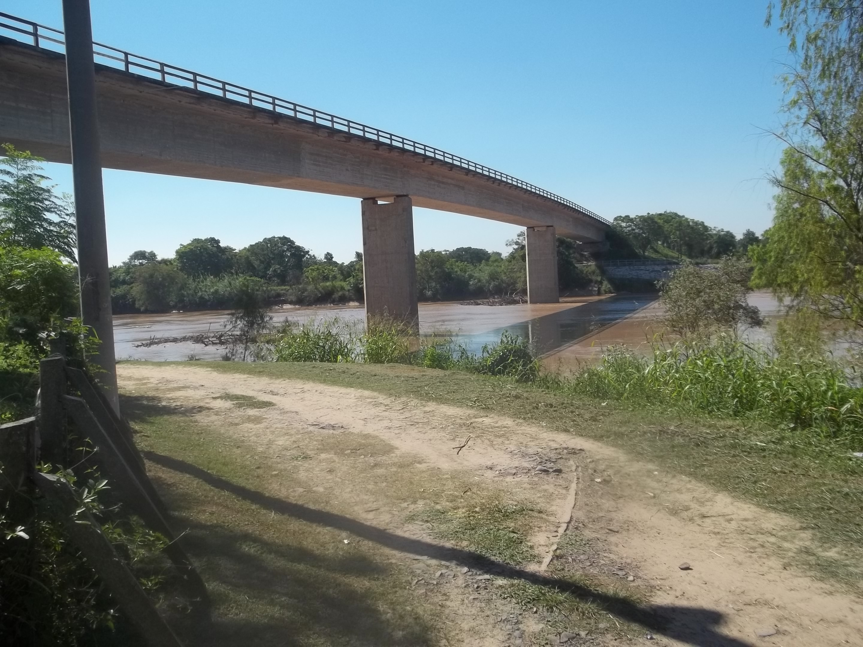 Vista desde el sur del puente sobre el río Bermejo, sobre Puerto Eva Perón.